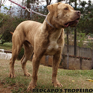 Bull-mastiff brasileiro macho, nome: Tropeiro.